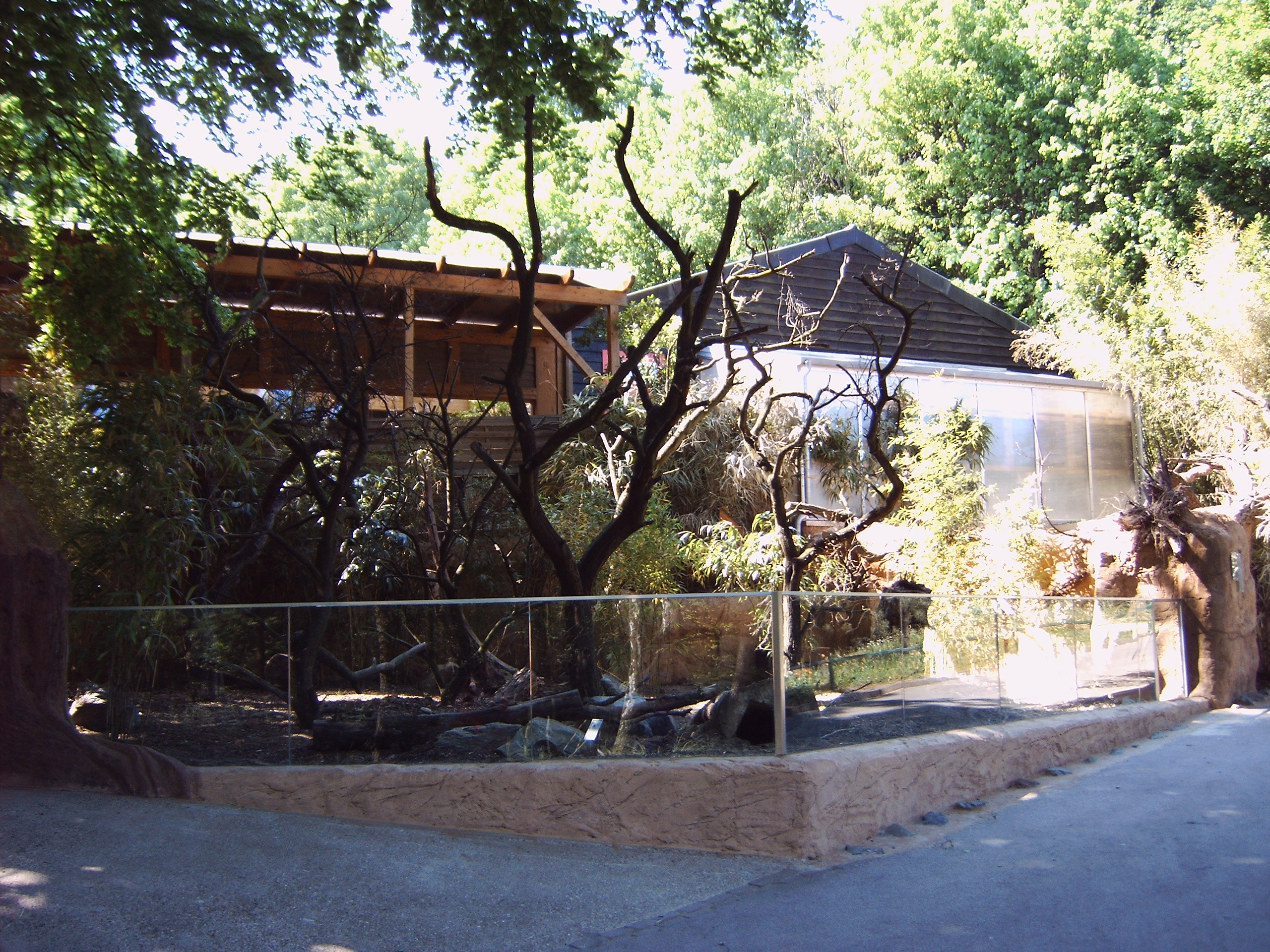 Koalahaus im Duisburger Zoo, Kim Dasbeck